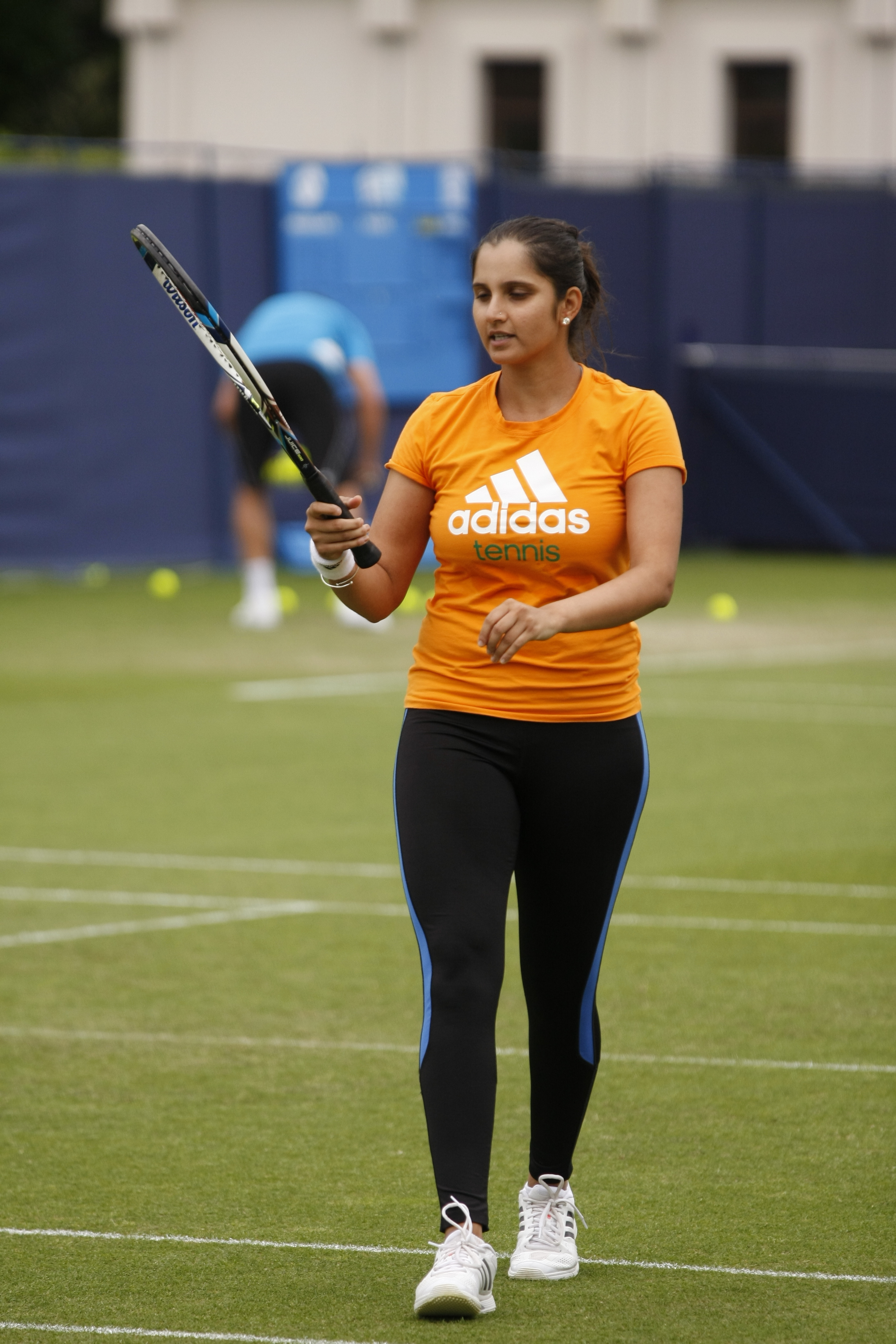 Sania Mirza